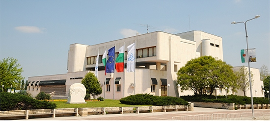 Дом на енергетика, Козлодуй